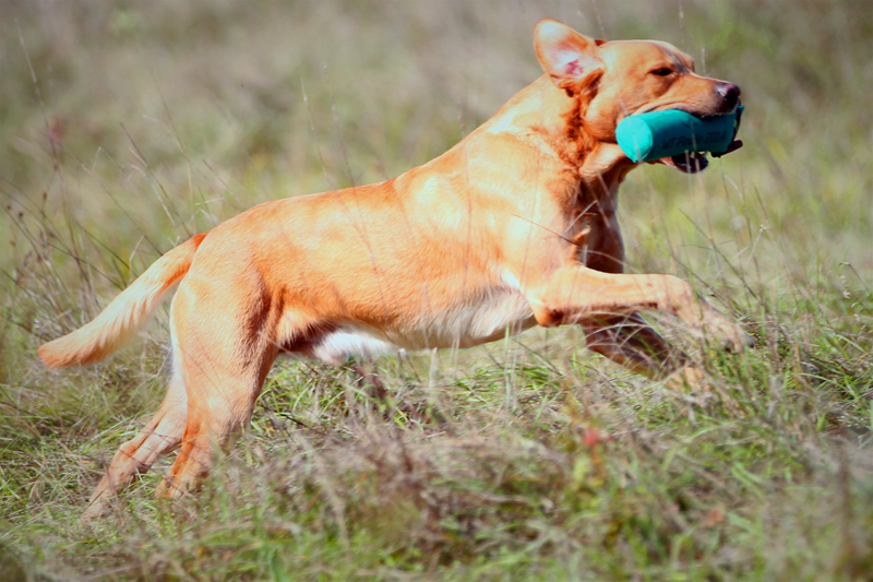 Xandro vom Fichtenhorst - WT Finále Milovice 2014